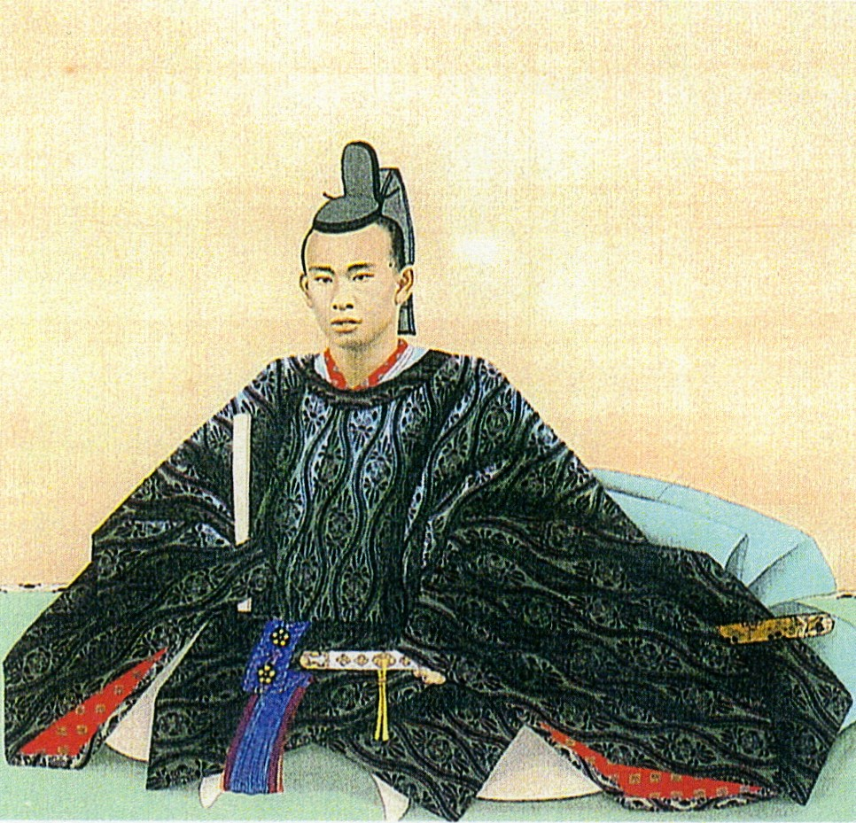 松平定昭の肖像。